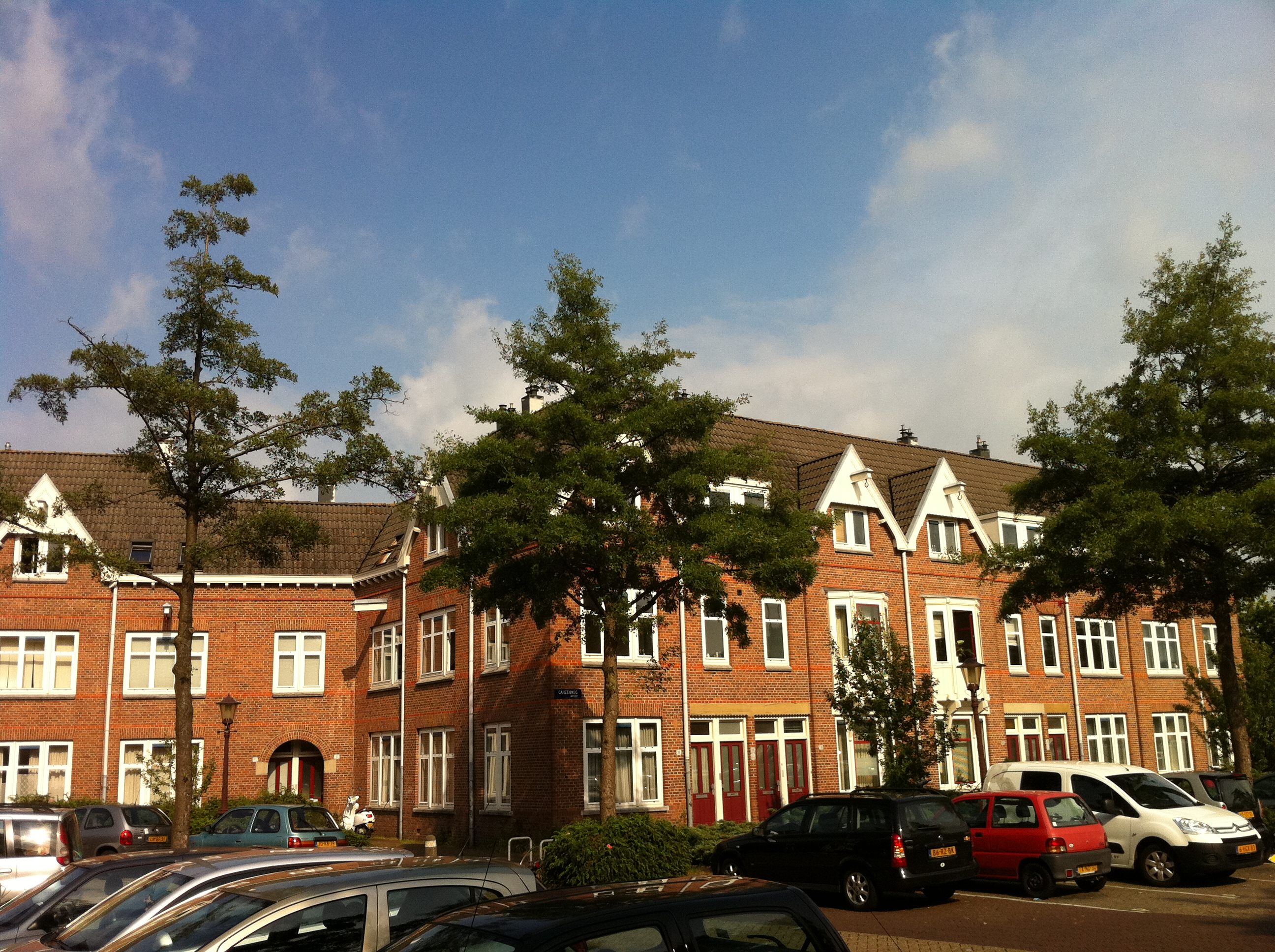 Ganzenweg, Amsterdam-Noord. Bouwplan van Maatschappij tot Huizenbouw benoorden het IJ NV, nu van woningcorporatie Ymere